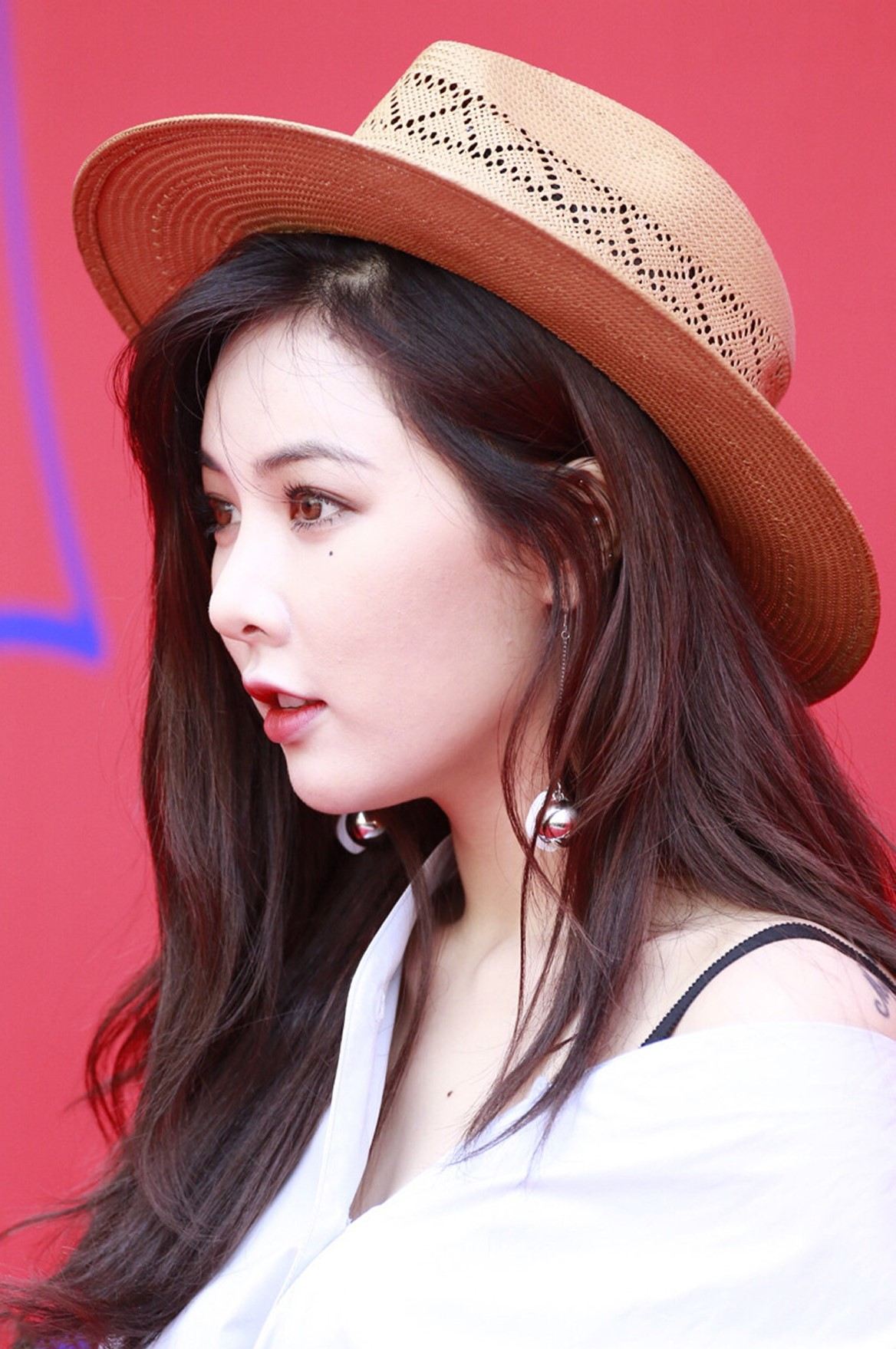 HyunA at the Seoul Fashion Week on March 24, 2016.